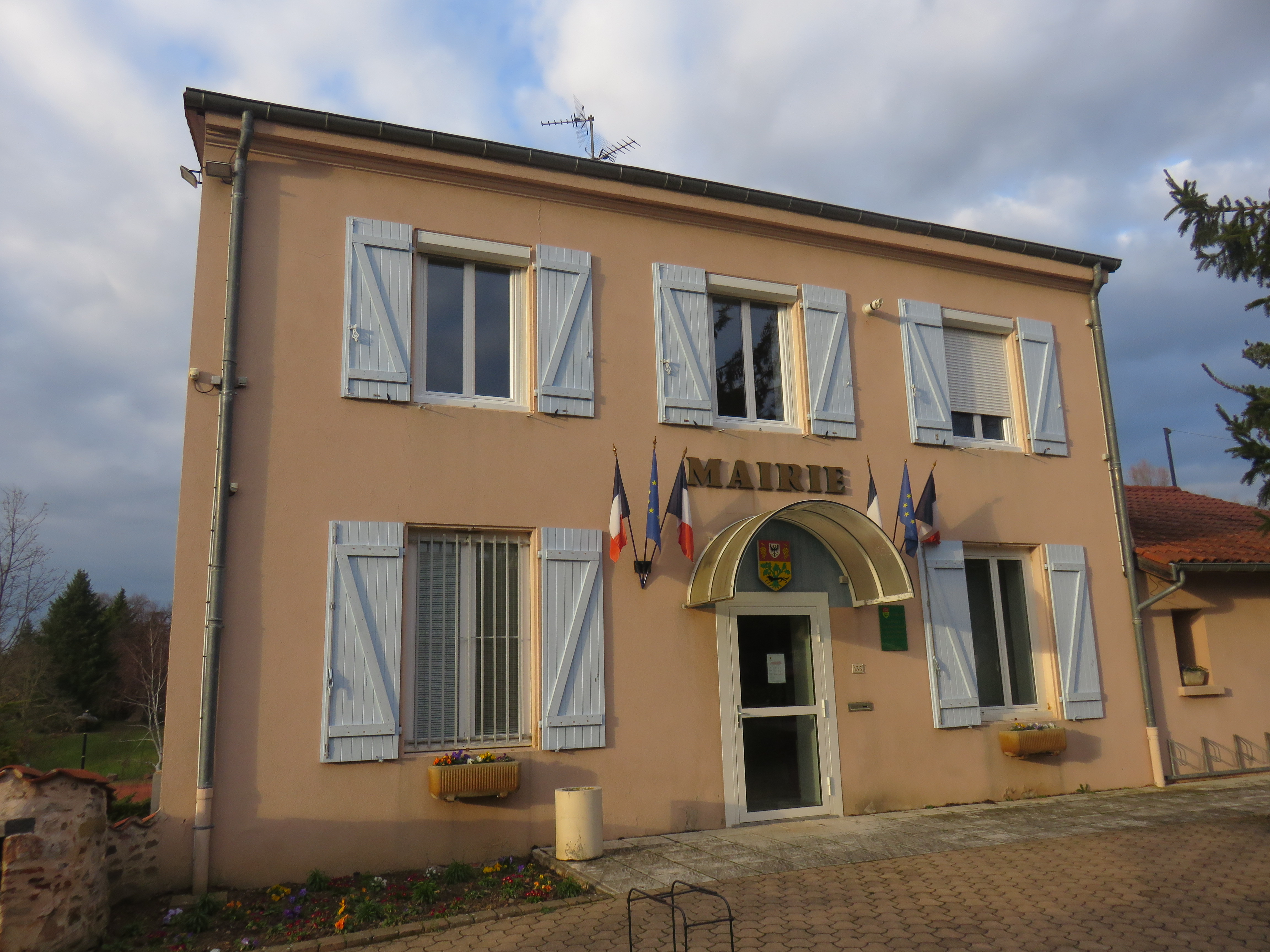 Mairie de Saint-Vincent-de-Boisset (Loire, France) en février 2018.